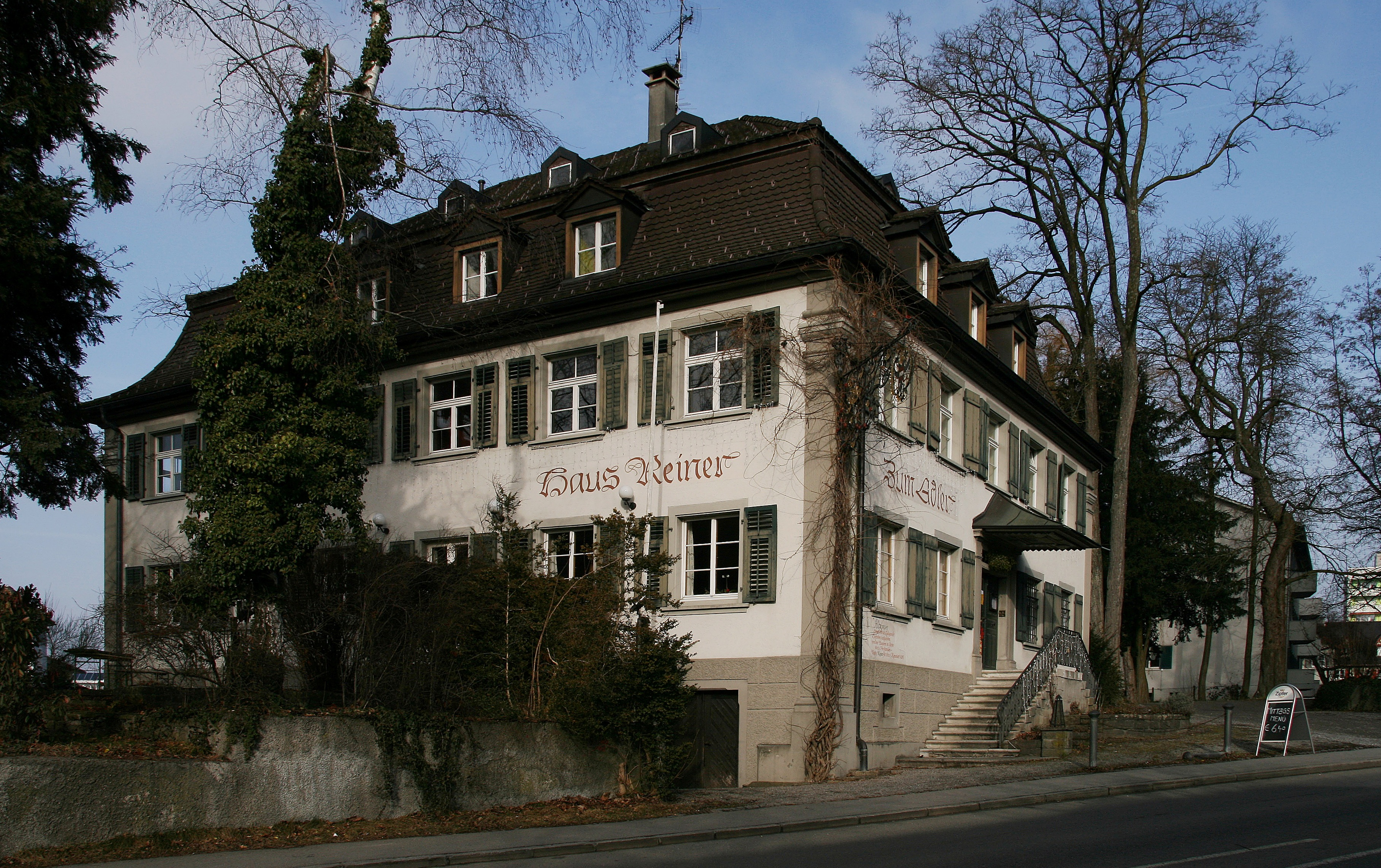 aus dem DEHIO Vorarlberg 1983: Hofriedstrasse, Nr.: 1 Gasthof Adler. Ehemals Landgericht, erbaut 1786; freistehender 2geschossiger Bau mit Kellersockel und Mansarddach, 5 zu 6 Achsen, Eckpilaster; barocker schmiedeeisener Ausleger und Stuckdecke im Inneren aus der Bauzeit. *** In Lochau, Vorarlberg